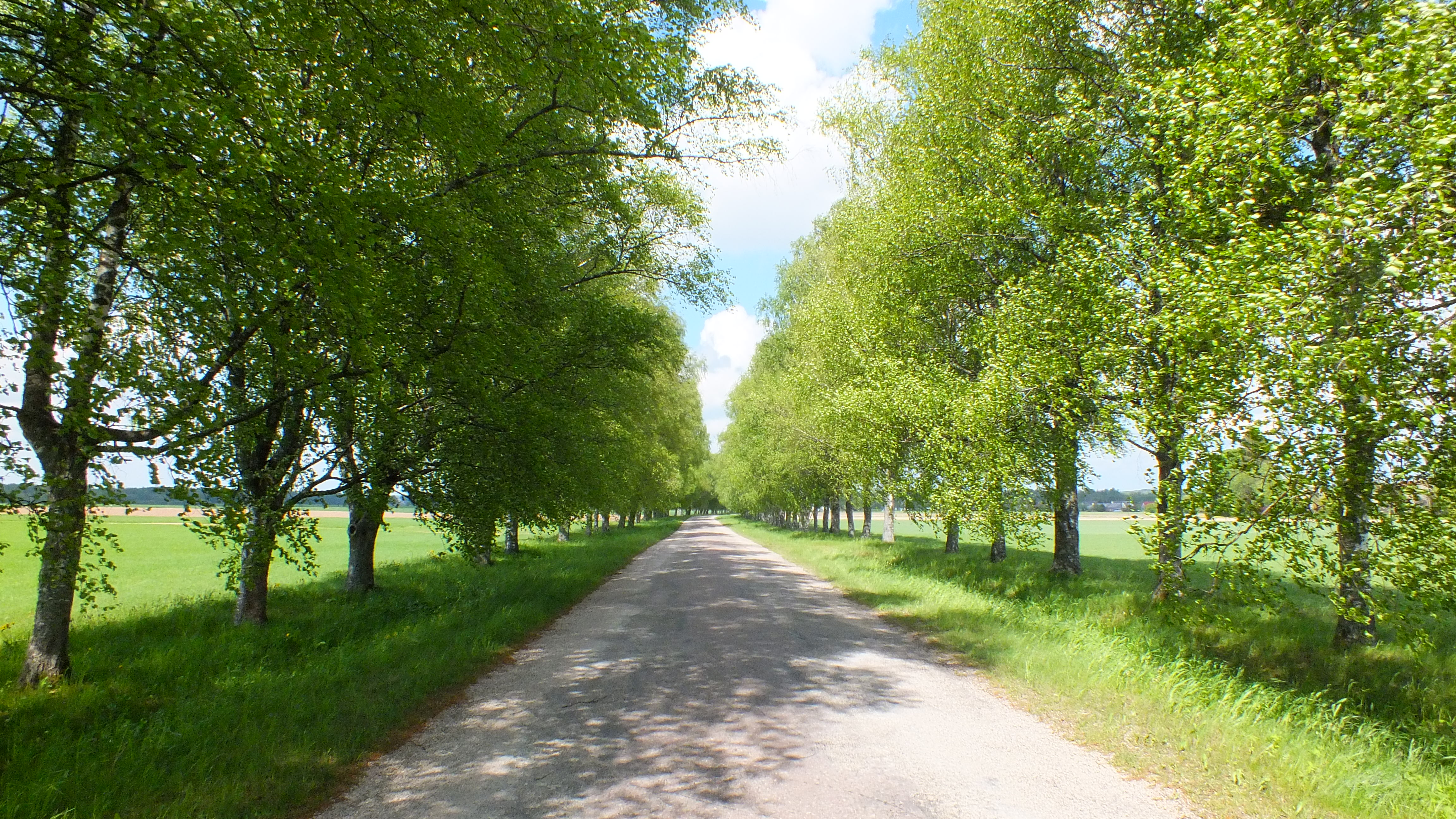 Dižstendes - Bungu kapu bērzu aleja